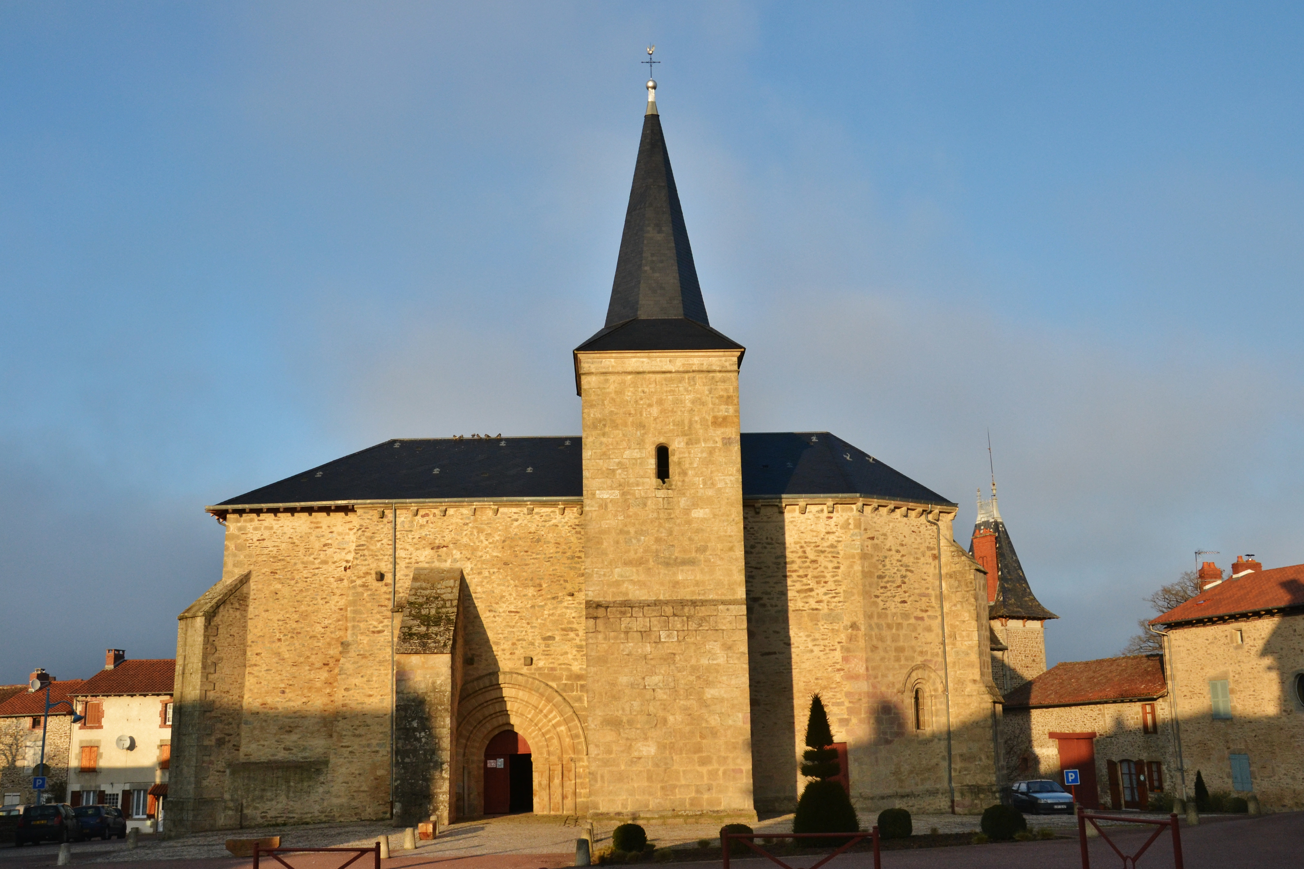 L'église de Peyrilhac (Haute-Vienne, France)